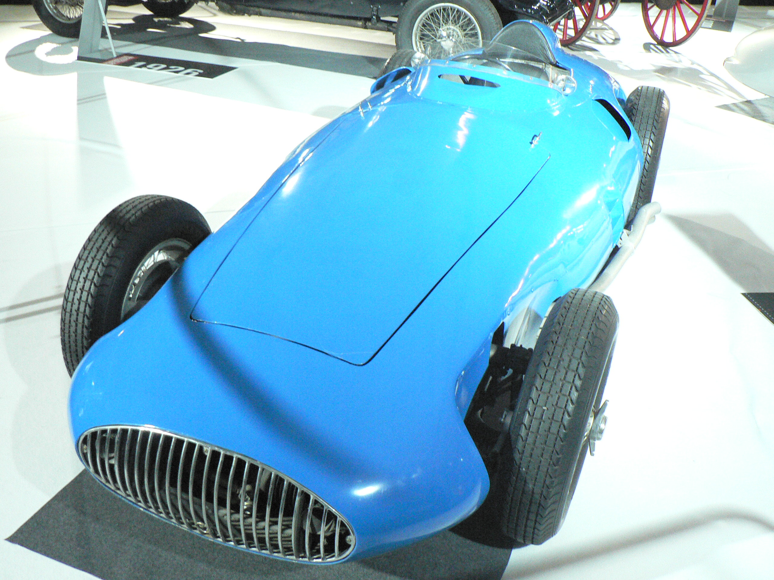 Mondial de l automobile de Paris (October 2006)